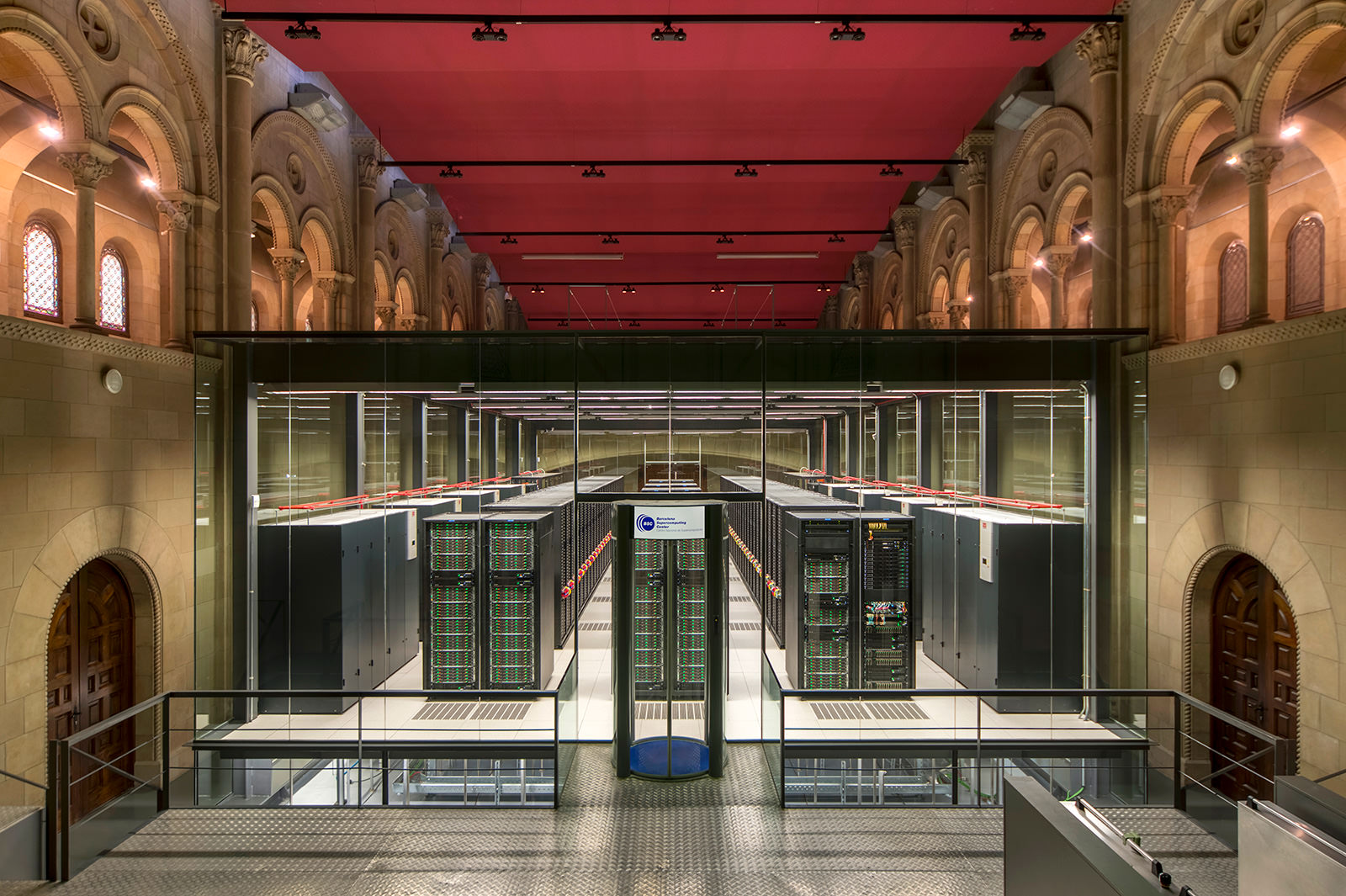 Superordinador MareNostrum 4, que va entrar en funcionament el juliol de 2017